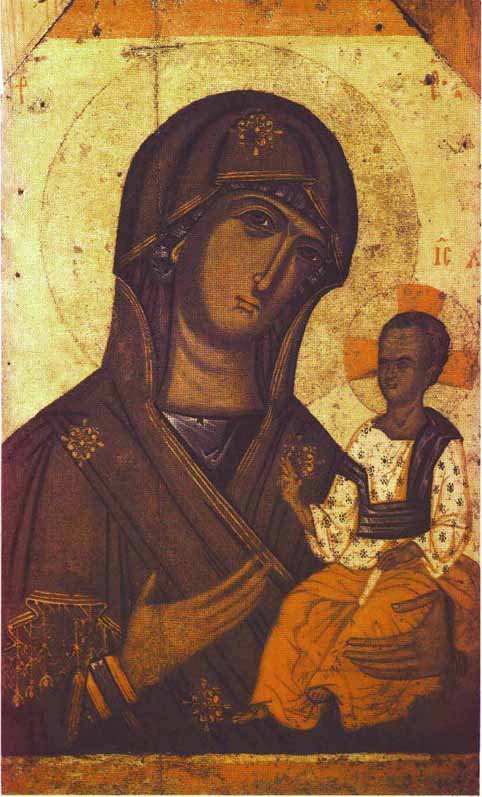 Our Lady of Volhynia